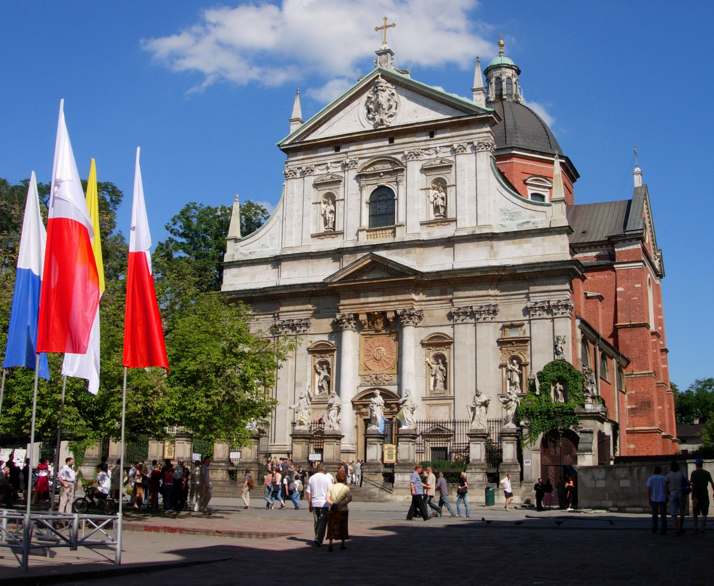 Ss. Peter and Paul church, Kraków, Poland